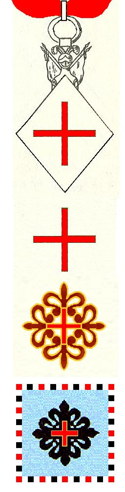 Insignia OLV van Montesa